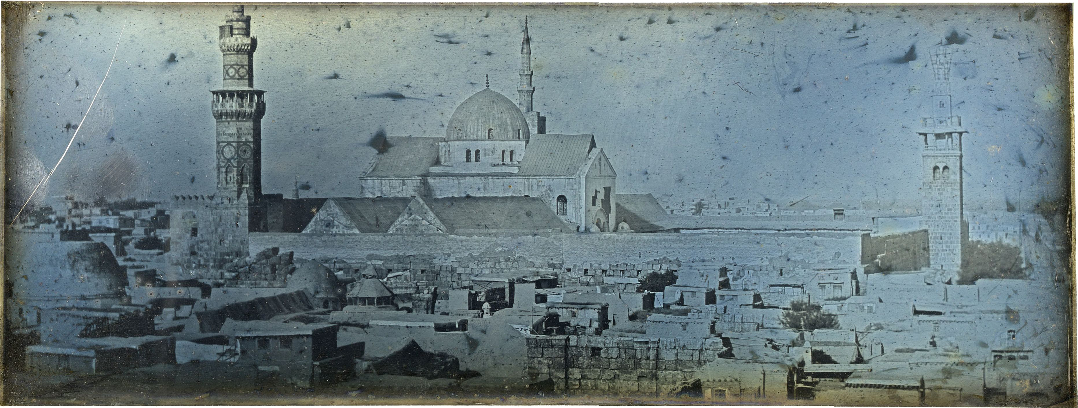 Daguerréotype, n. et b. ; 8,8 x 23,5 cm.